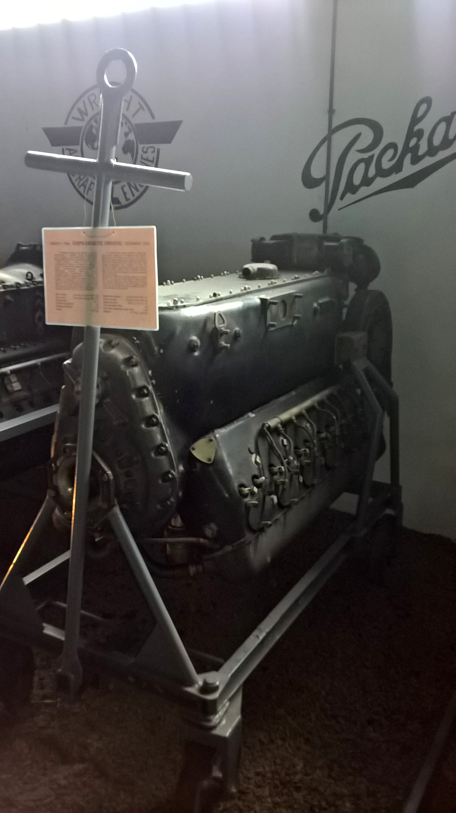 Niemiecki 12-cylindrowy silnik widlasty Daimler-Benz DB 600 z 1935 r. ze zbiorów Muzeum Lotnictwa Polskiego w Krakowie.